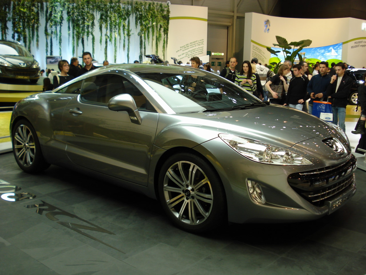 Peugeot 308 RCZ au salon de Genève 2009